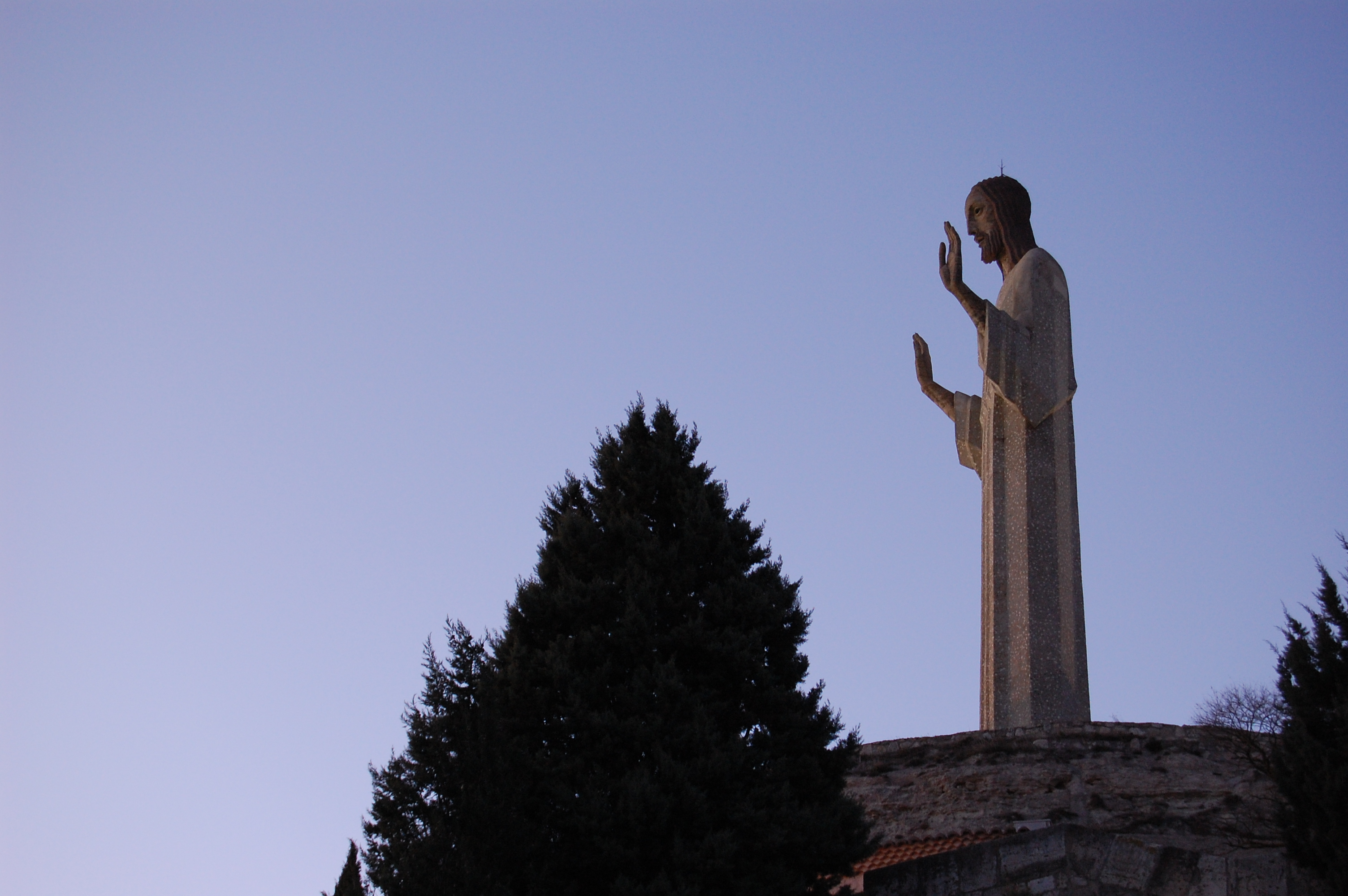 Estatua del Cristo del Otero, de Victorio Macho. Palencia (Castilla y León, España)